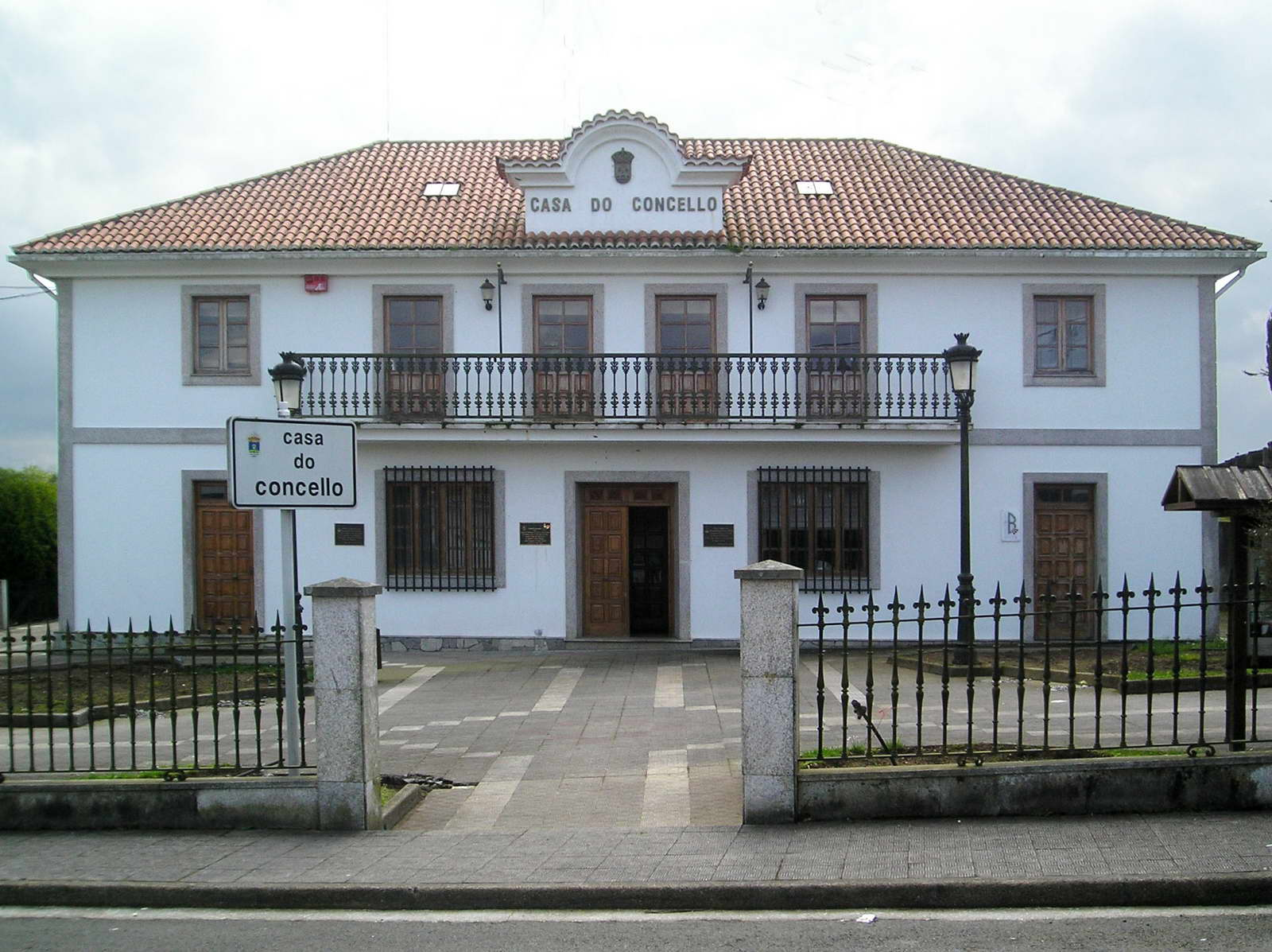 Concello de Boqueixón